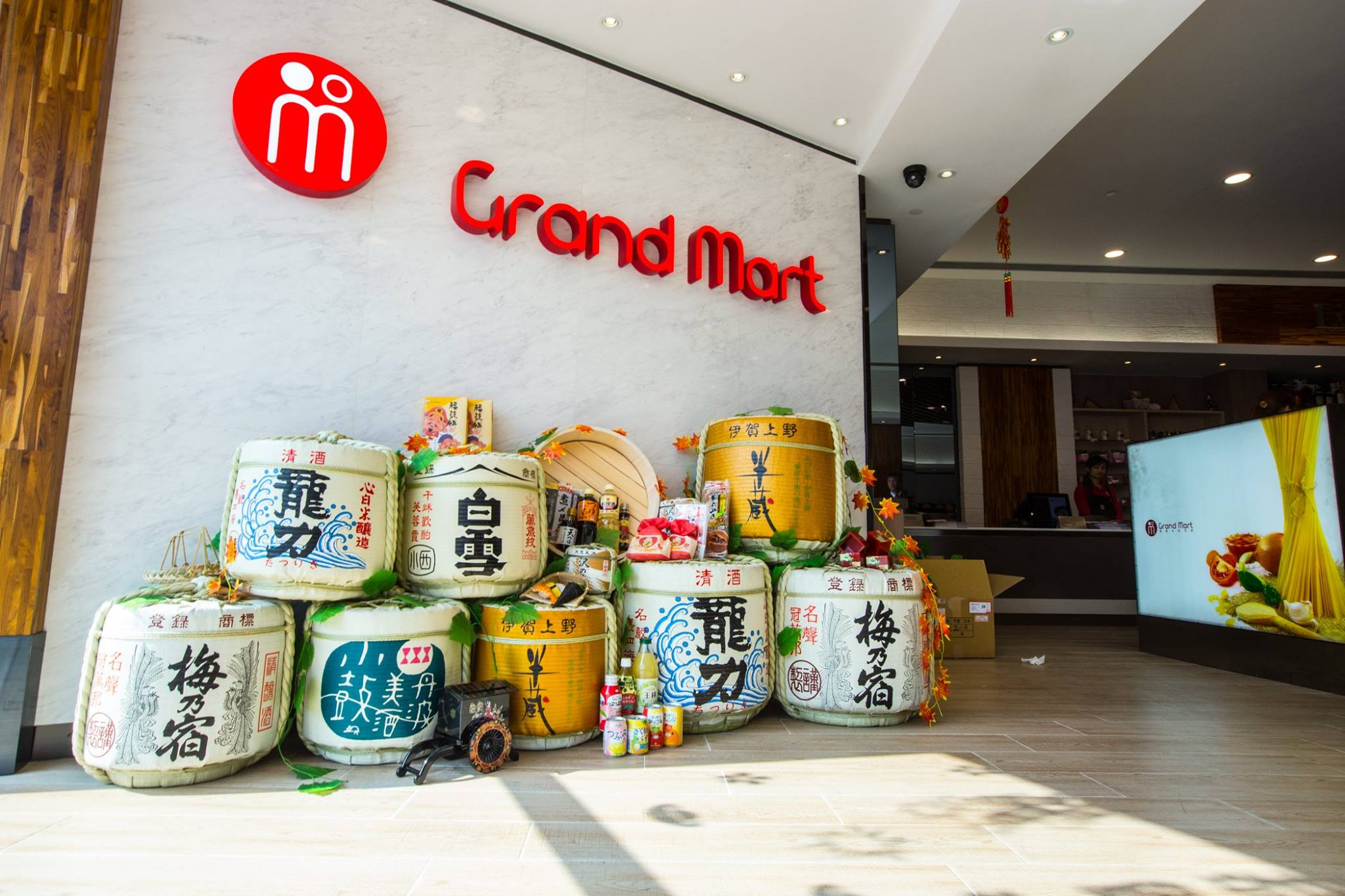 グランドマートの入り口。